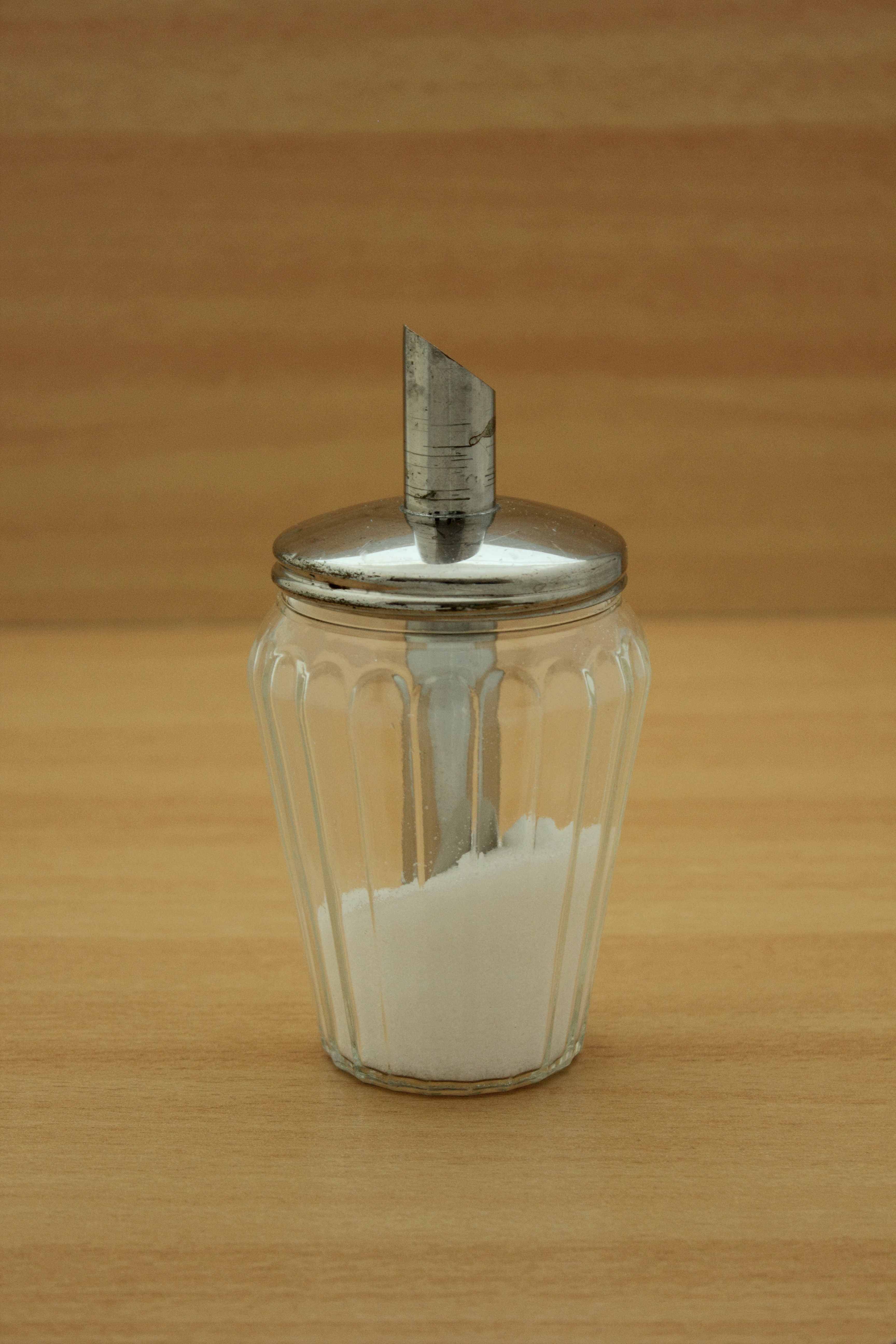 Zuckerstreuer "Süßer Heinrich" beim 12. WP Fotoworkshop im Lichtzelt aufgenommen, Weißabgleich überarbeitet.